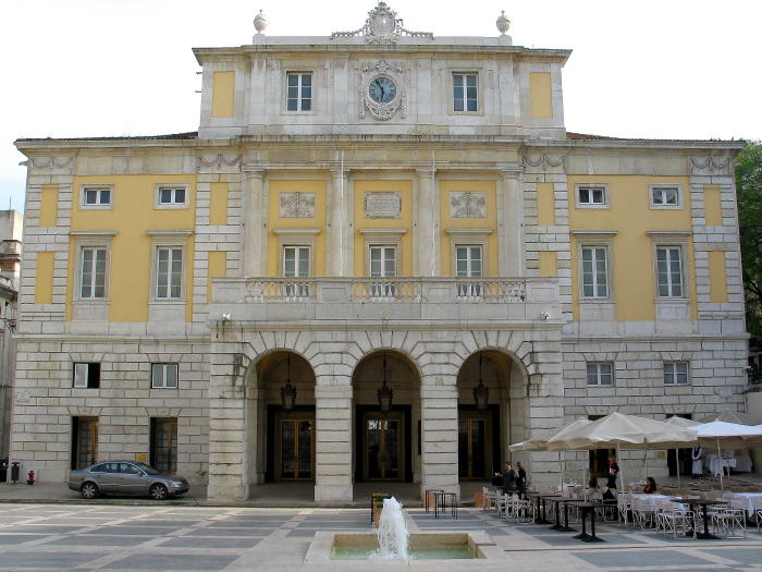 Fachada do Teatro Nacional de São Carlos, em Lisboa, Portugal.